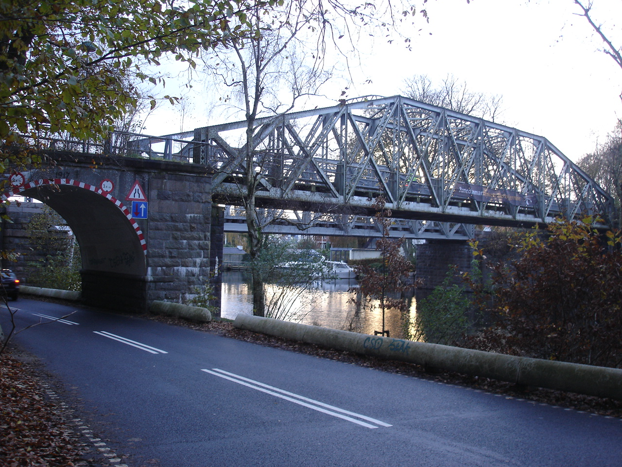 Gudenåbroerne set nede fra Sejsvej